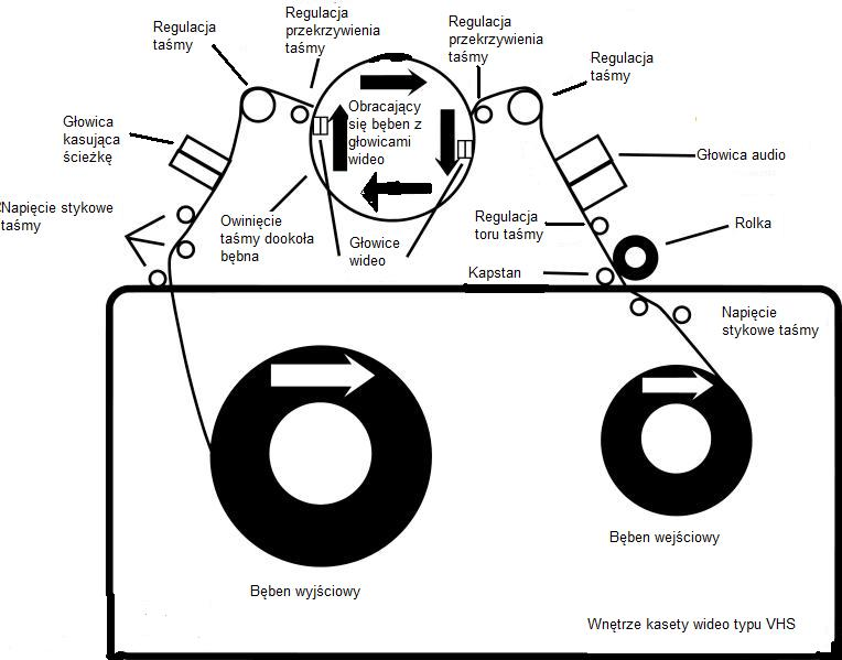 Polonizacja pracy z angielskiej Wikipedii (Polish version to english Wikipedia)